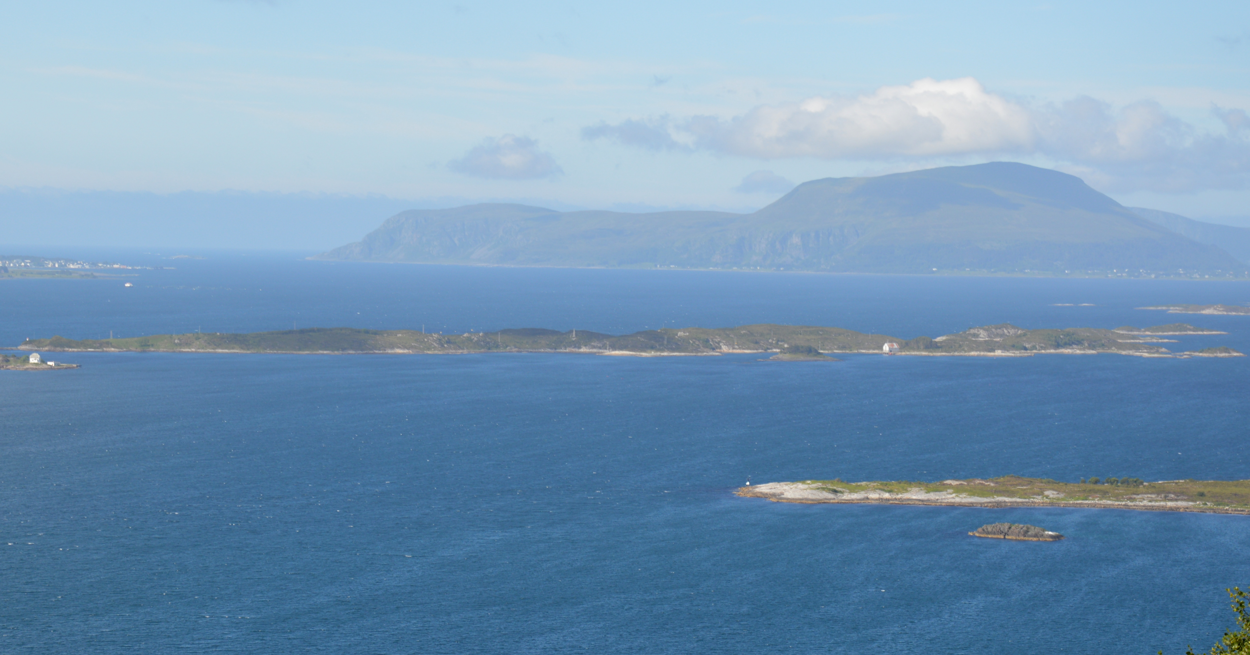 Hamnøya Giske 2017